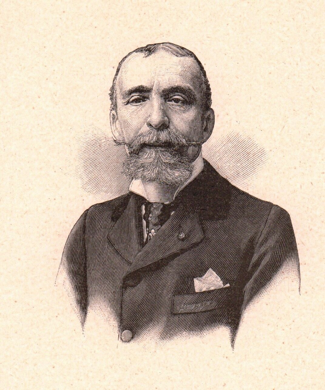 French writer Ernest Daudet (1837-1921)